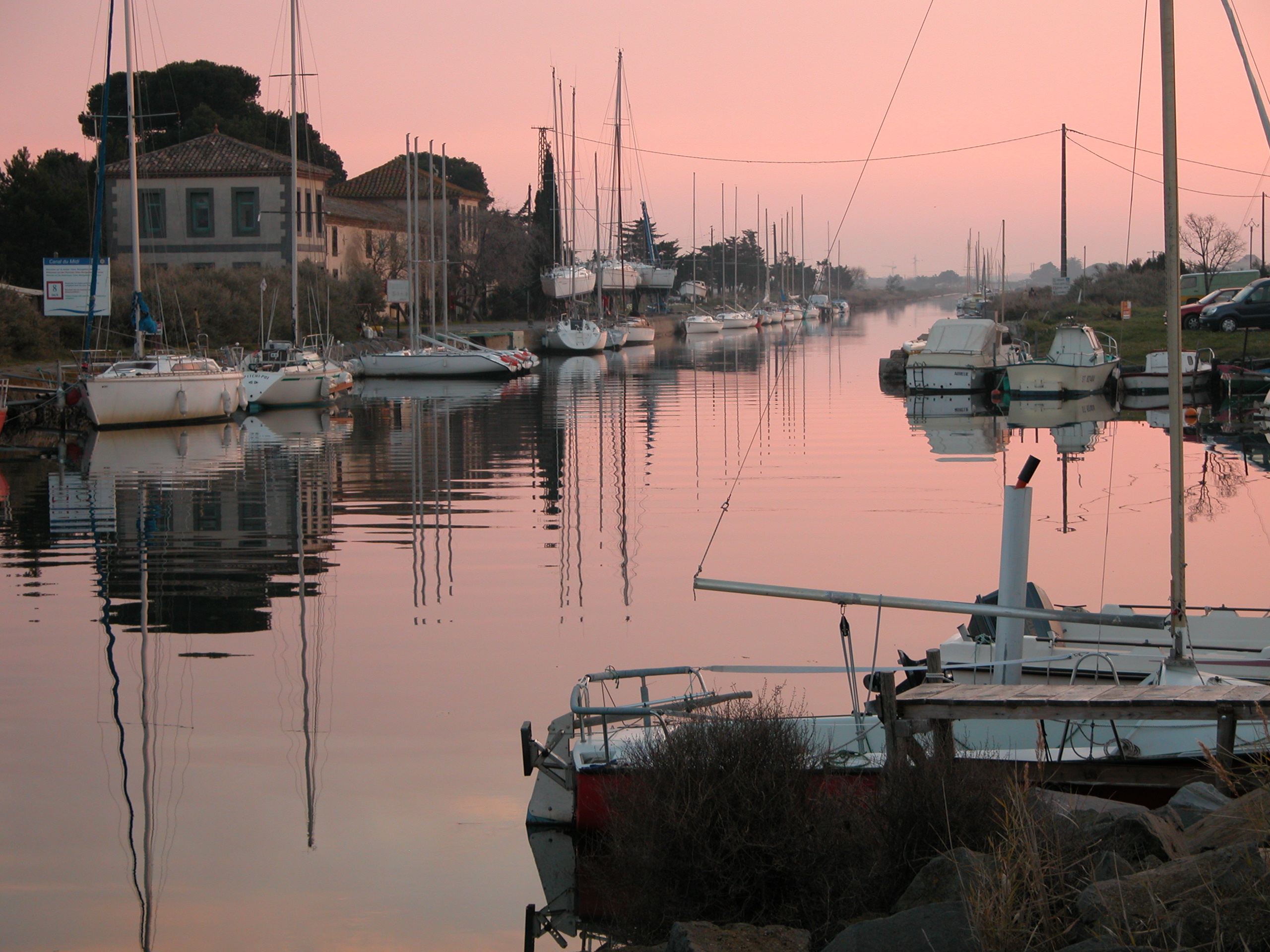 Le Canal du Midi rejoint l'Étang de Thau à Marseillan- Photo personnelle non retouchée.